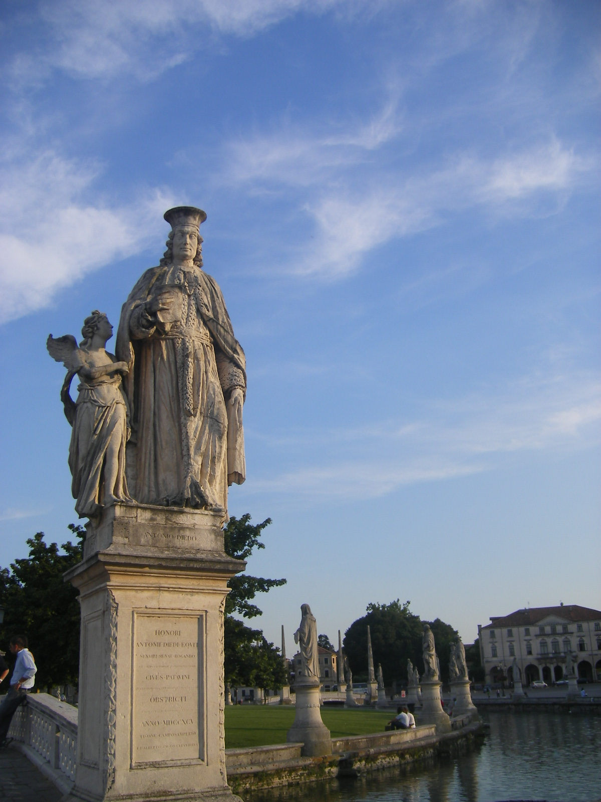 Antonio Diedo Padova - Prato della Valle